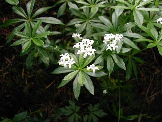 Galium odoratum